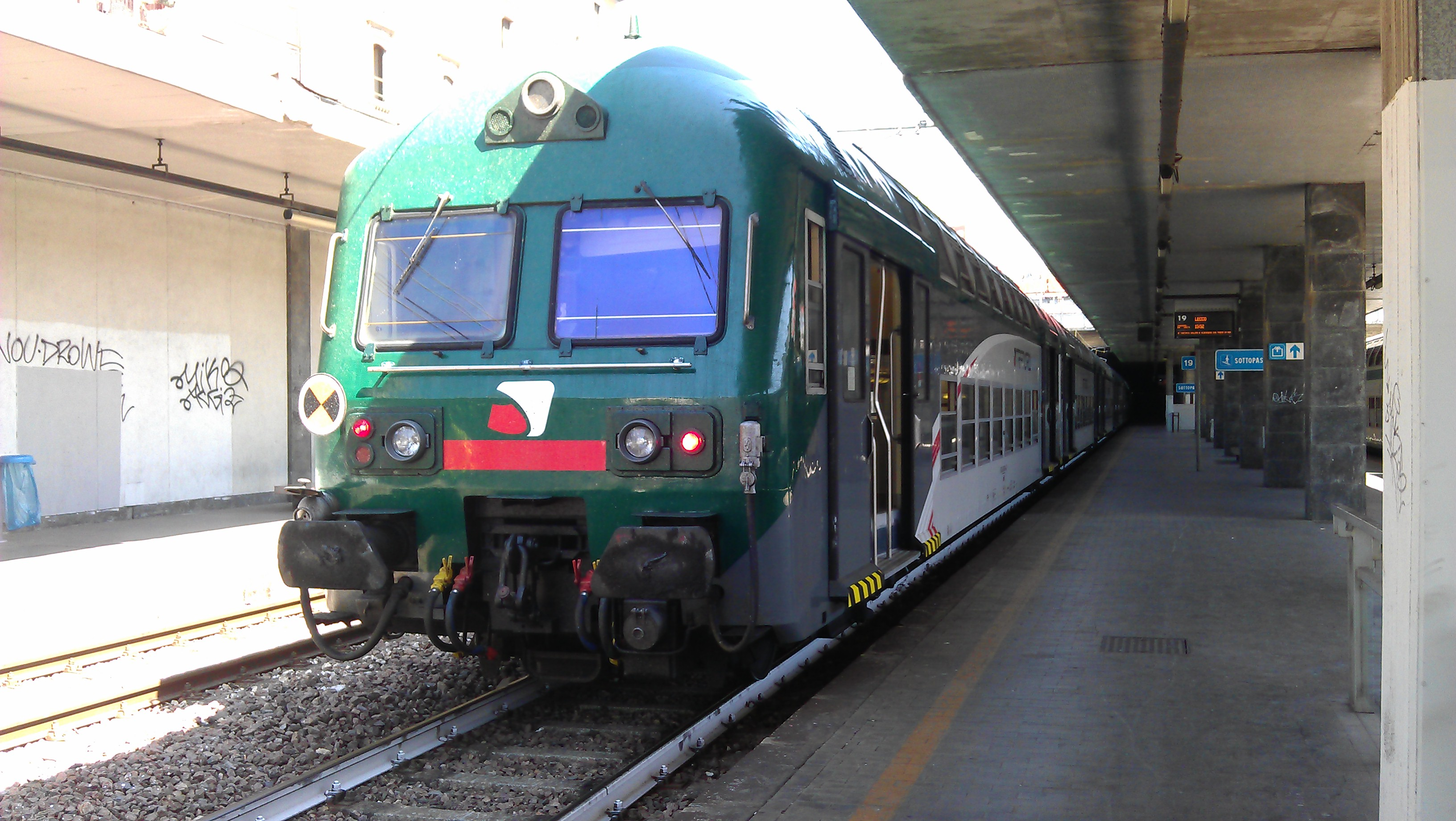 Carrozza pilota a due piani in livrea Trenord, in servizio sulla linea S8 del servizio ferroviario suburbano di Milano. Foto presa al capolinea di Milano Porta Garibaldi